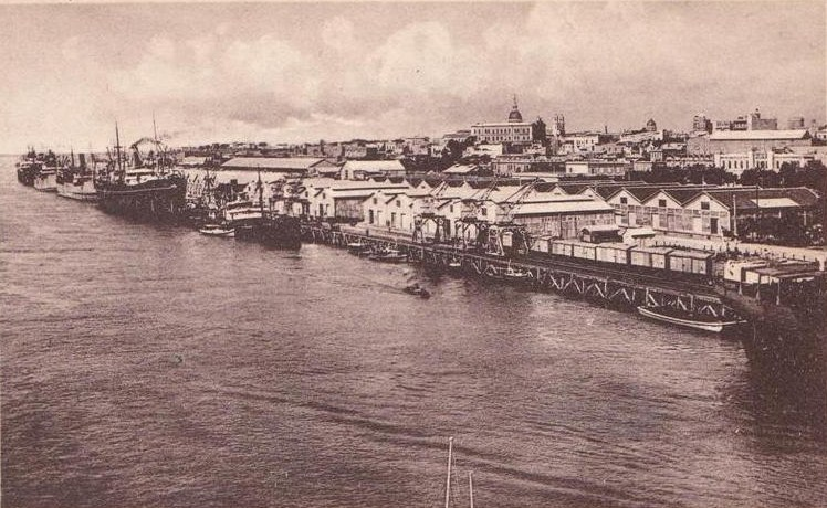 Muelles de Importacion en el Puerto de Rosario de Santa Fe, principios del siglo XX.